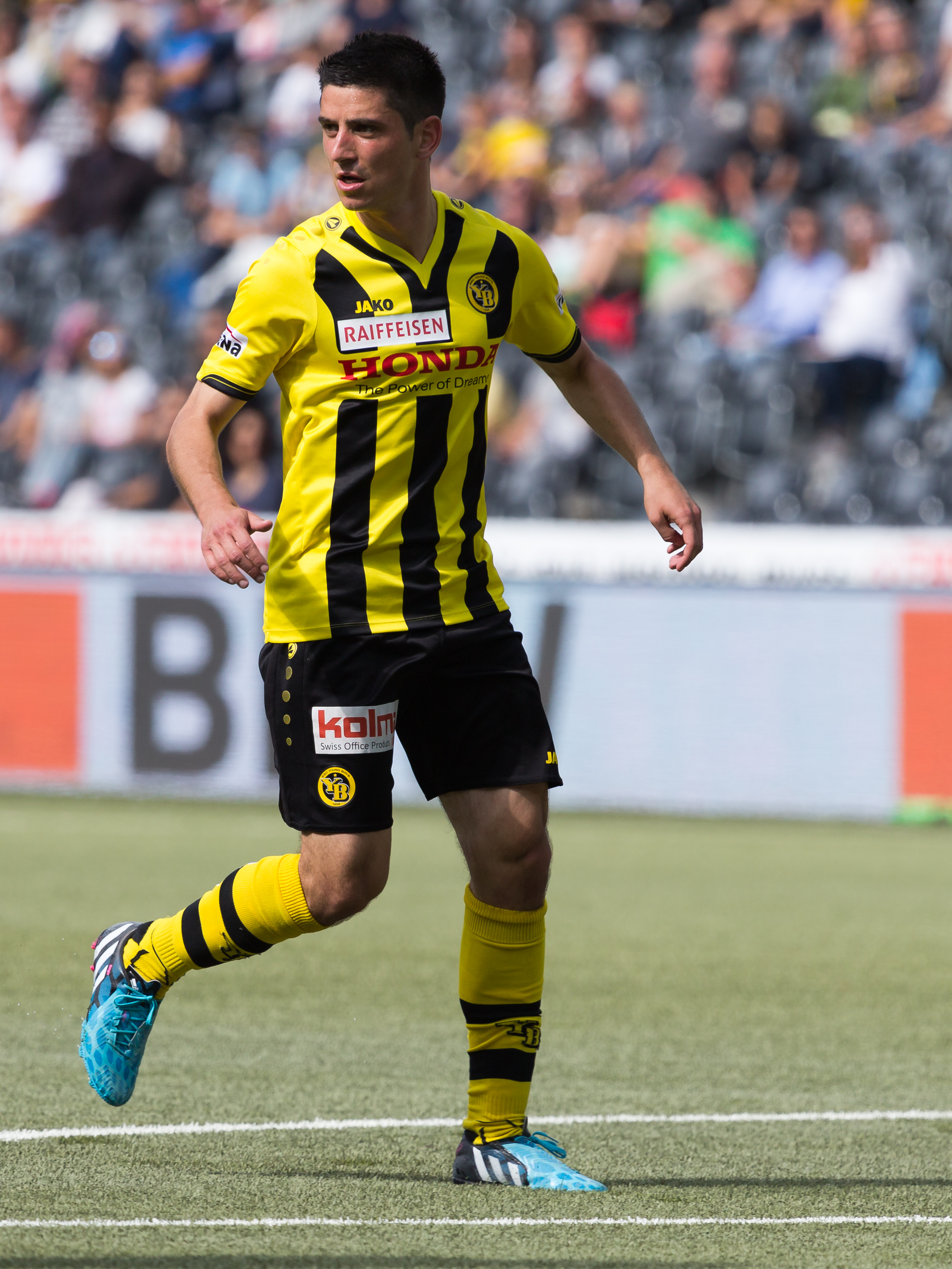 Moreno Costanzo beim Spiel des BSC Young Boys gegen den FC Luzern